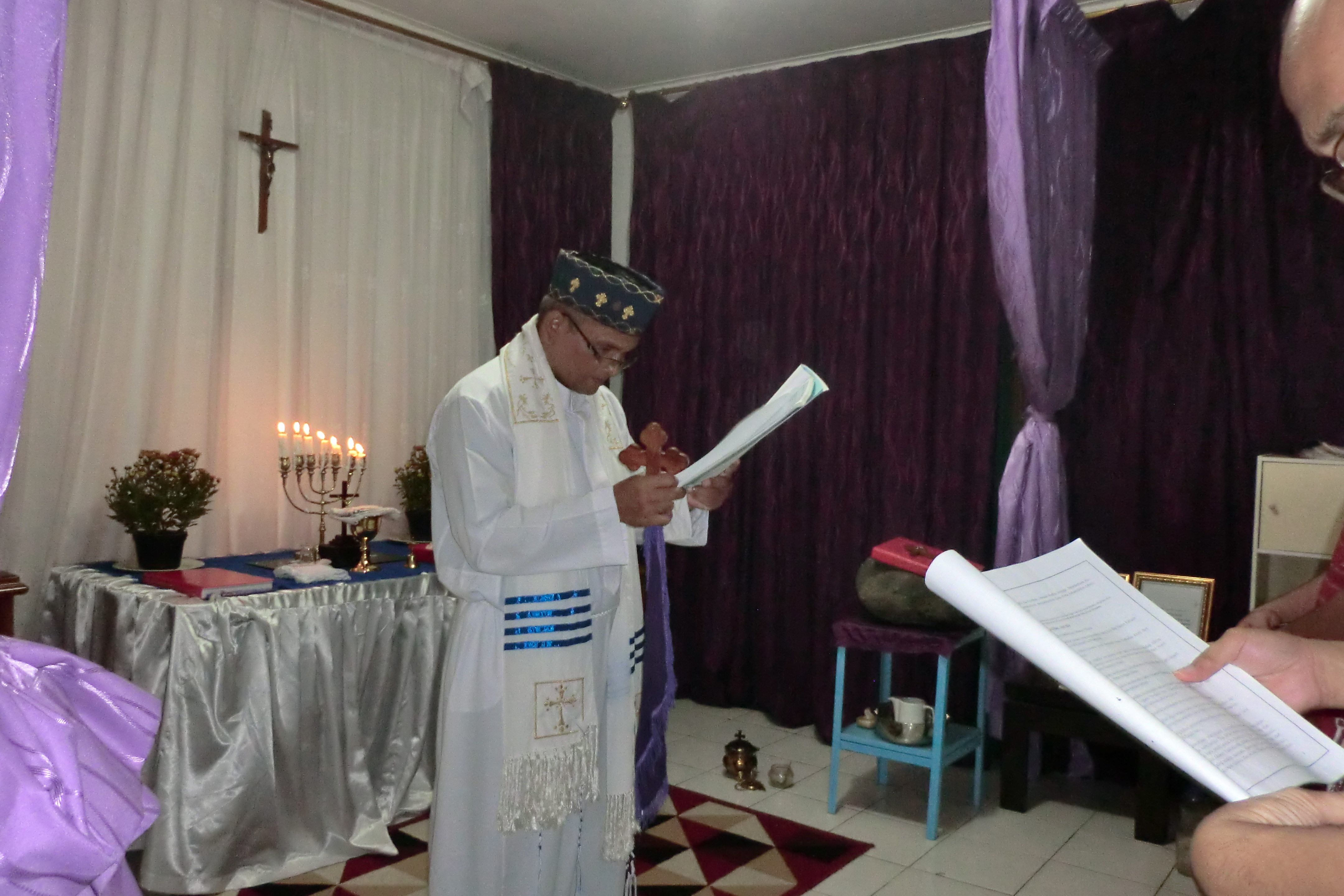 Mar Nicholas sedang mengajar di Paroki Mar Yakub Jakarta